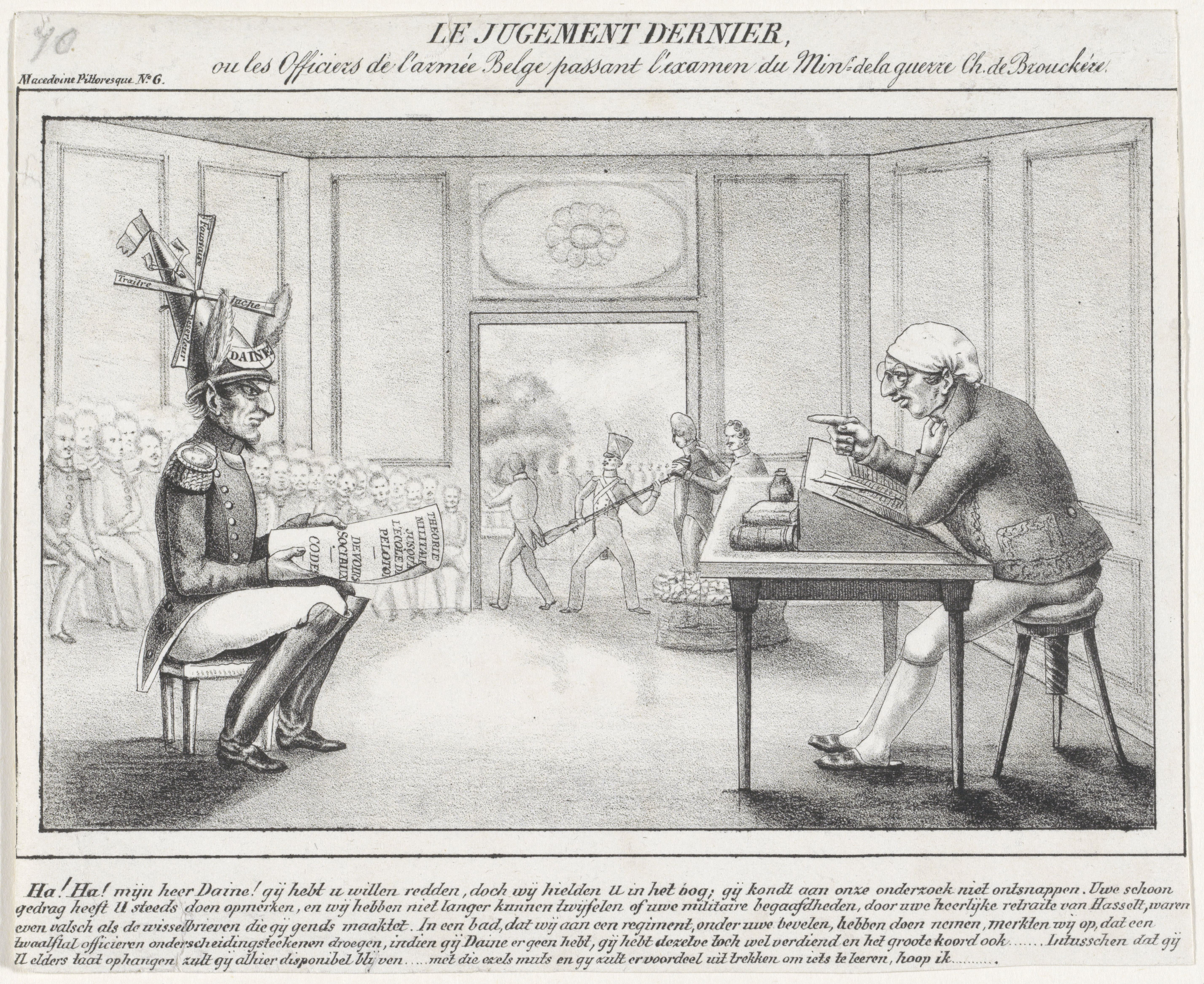 IdentificatieTitel(s): Daine aangeklaagd, 1831Le Jugement Dernier (titel op object)Objecttype: prent spotprent Objectnummer: RP-P-OB-88.435Catalogusreferentie: FMH 6731Atlas van Stolk 7105Opschriften / Merken: opschrift, linksboven, gedrukt: ‘Macedoine Pittoresque No. 6’ (niet in Lugt)verzamelaarsmerk, verso, gestempeld: Lugt 2166Omschrijving: Spotprent op de reorganisatie van Daine's leger door de Minister van Oorlog Charles de Brouckère na de nederlaag van het Belgische Maasleger bij Hasselt op 8 augustus 1831. Generaal Daine zit op een klein krukje met een puntmuts met een molen op zijn hoofd. Tegenover hem zit de minister achter een tafel. Met Franse titel en vijfregelig Nederlands onderschrift.VervaardigingVervaardiger: prentmaker: Nicolaas PienemanPlaats vervaardiging: NederlandDatering: 1831Fysieke kenmerken: lithografieMateriaal: papier Techniek: lithografie (techniek)Afmetingen: blad: h 162 mm × b 197 mmOnderwerpWat: Slag bij HasseltWanneer: 1831-08-08 - 1831-08-08Wie: Nicolas Joseph DaineCharles de BrouckèreVerwerving en rechtenVerwerving: aankoop 1881Copyright: Publiek domein